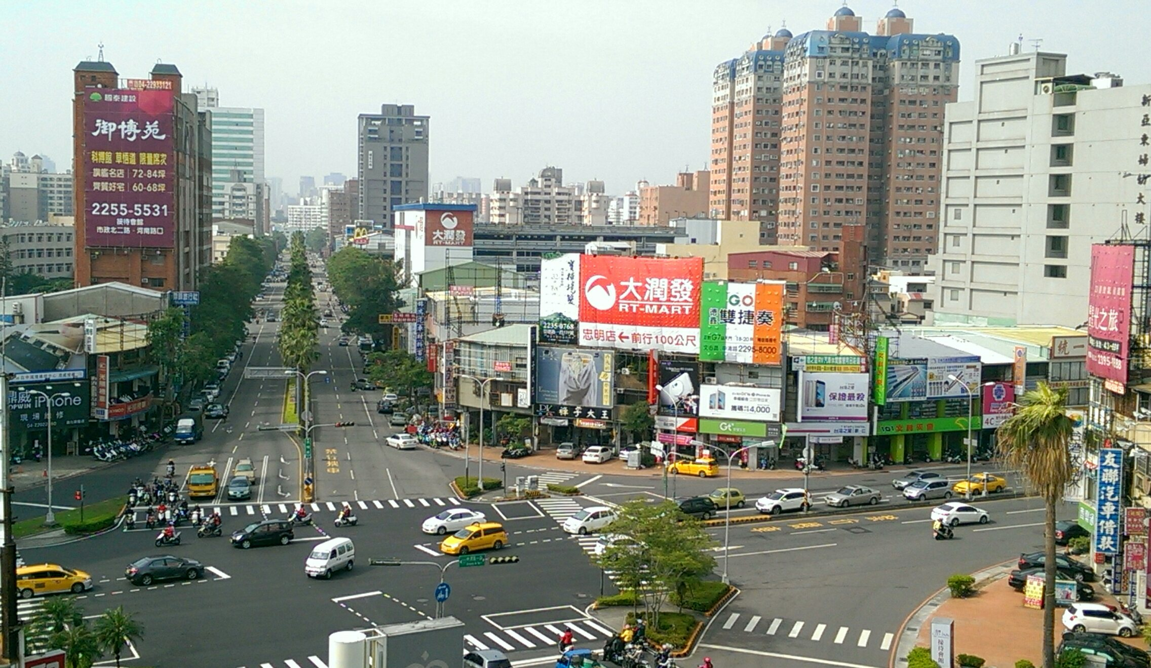 中文（台灣）: 臺中市北區進化路與中清路口，俯視忠明路。